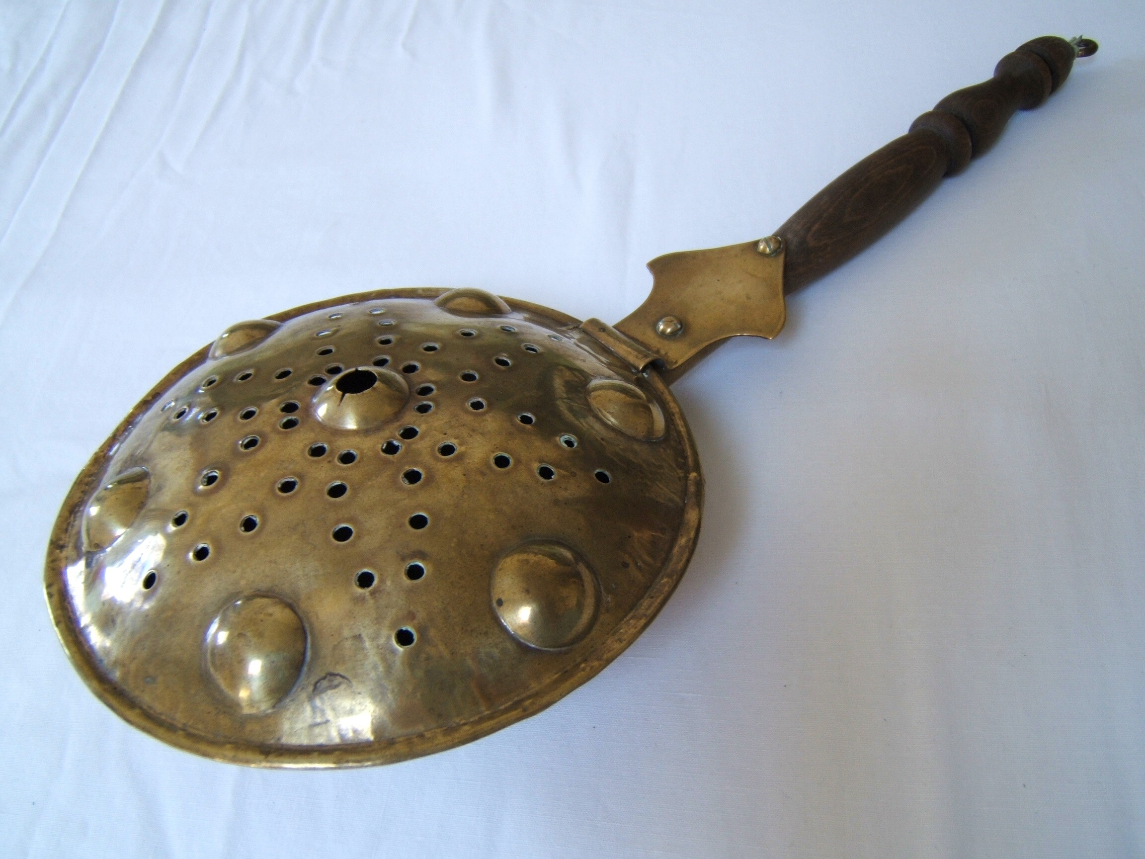 Beddenpan, met geel koperen klep (bovenzijde)